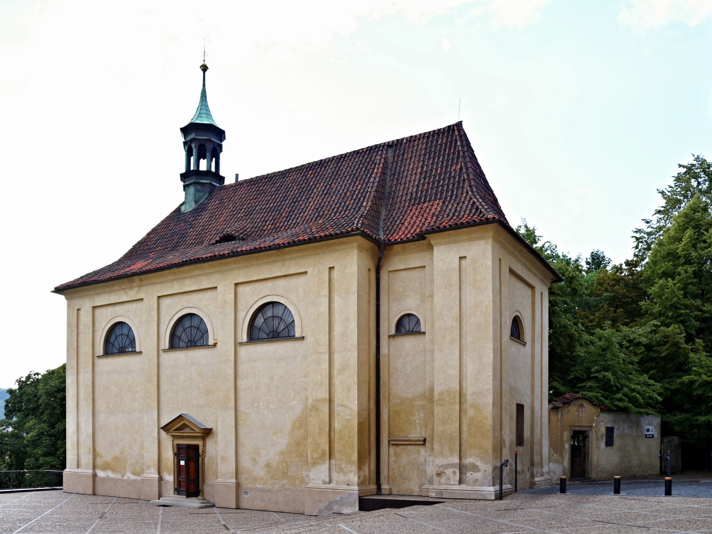 Chrám svatých Kosmy a Damiána v Emauzském klášteře, Praha